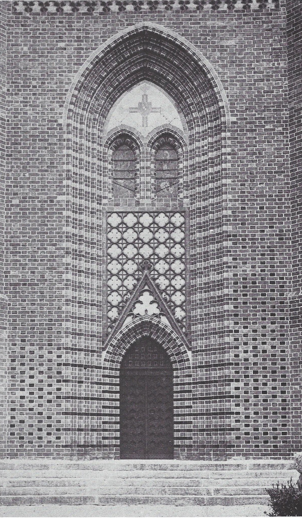 Majolika-Portal der Kirche in Cadinen in Ostpreußen. Stiftung von Kaiser Wilhelm II.